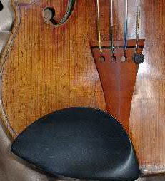 Husle